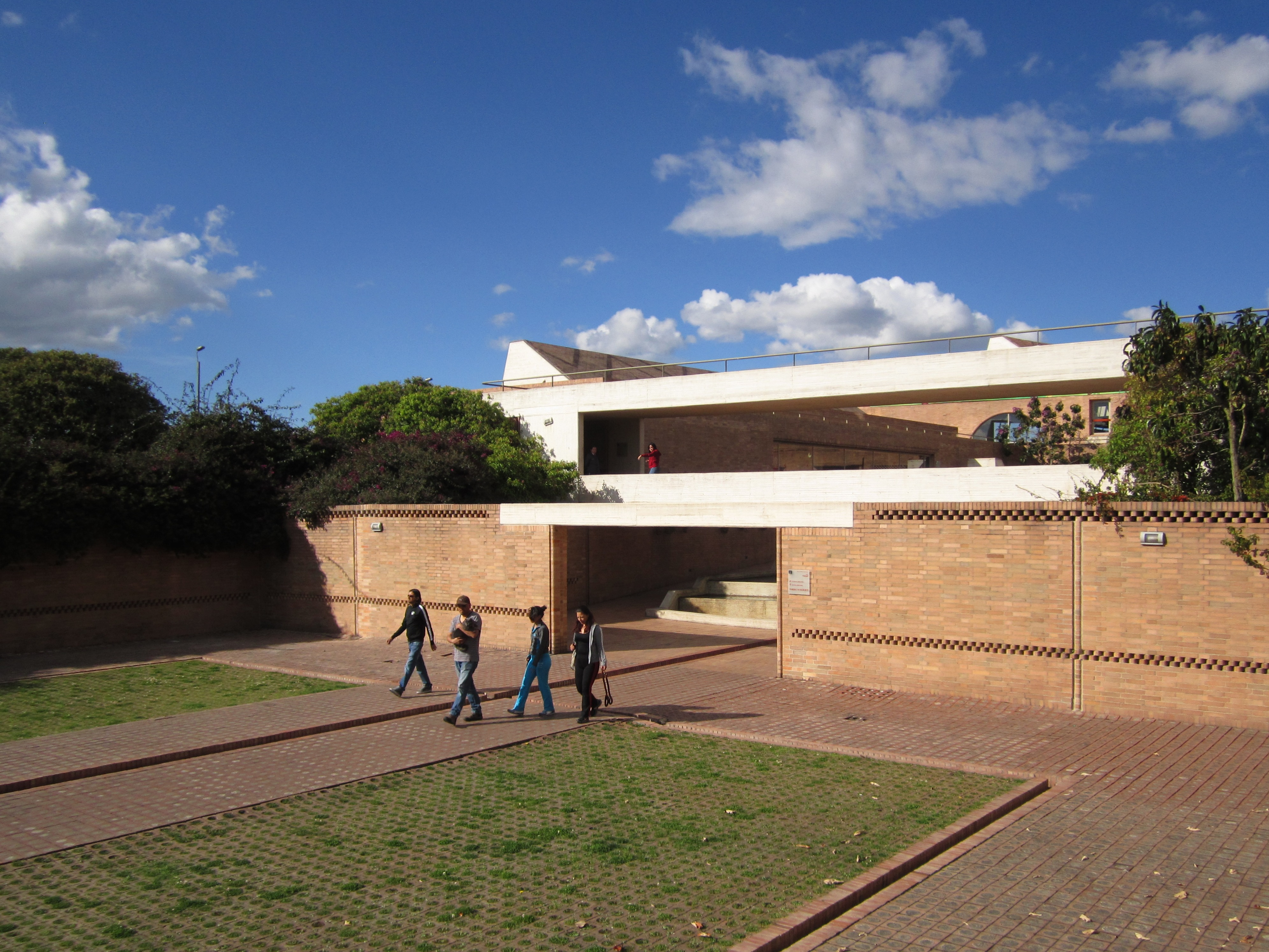 Explanada del acceso principal de la Biblioteca Virgilio Barco, diseñada por el arquitecto Rogelio Salmona como parte del Parque Metropolitano Simón Bolívar. Se inauguró el 21 de diciembre de 2001.